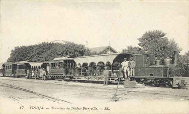 Gare ferroviaire de Tindja